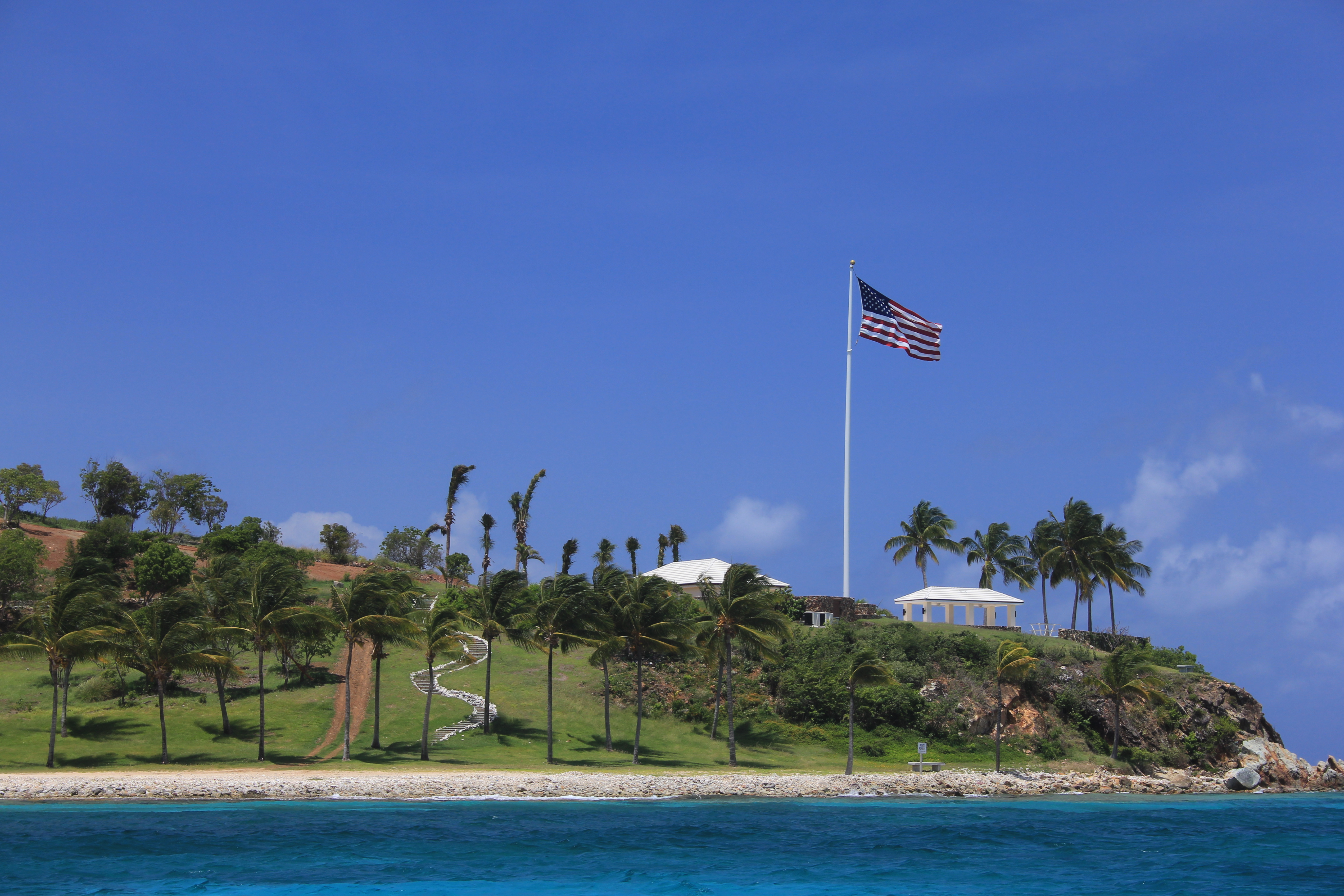 USVI